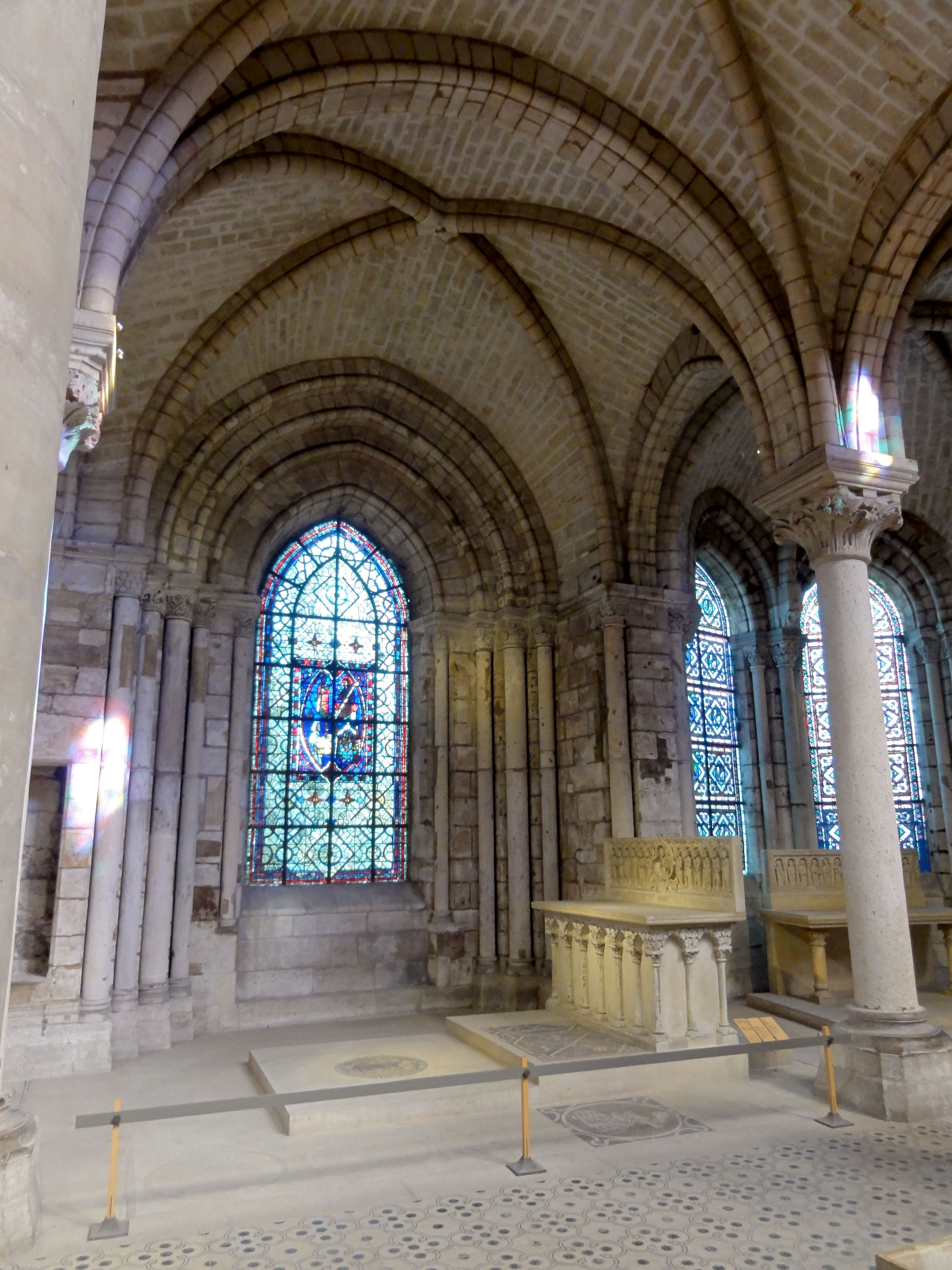 Chapelle St-Firmin.